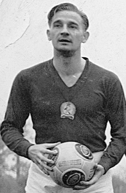 Lóránt Gyula magyar labdarúgó, az Aranycsapat keménységéről ismert középhátvédje, edző